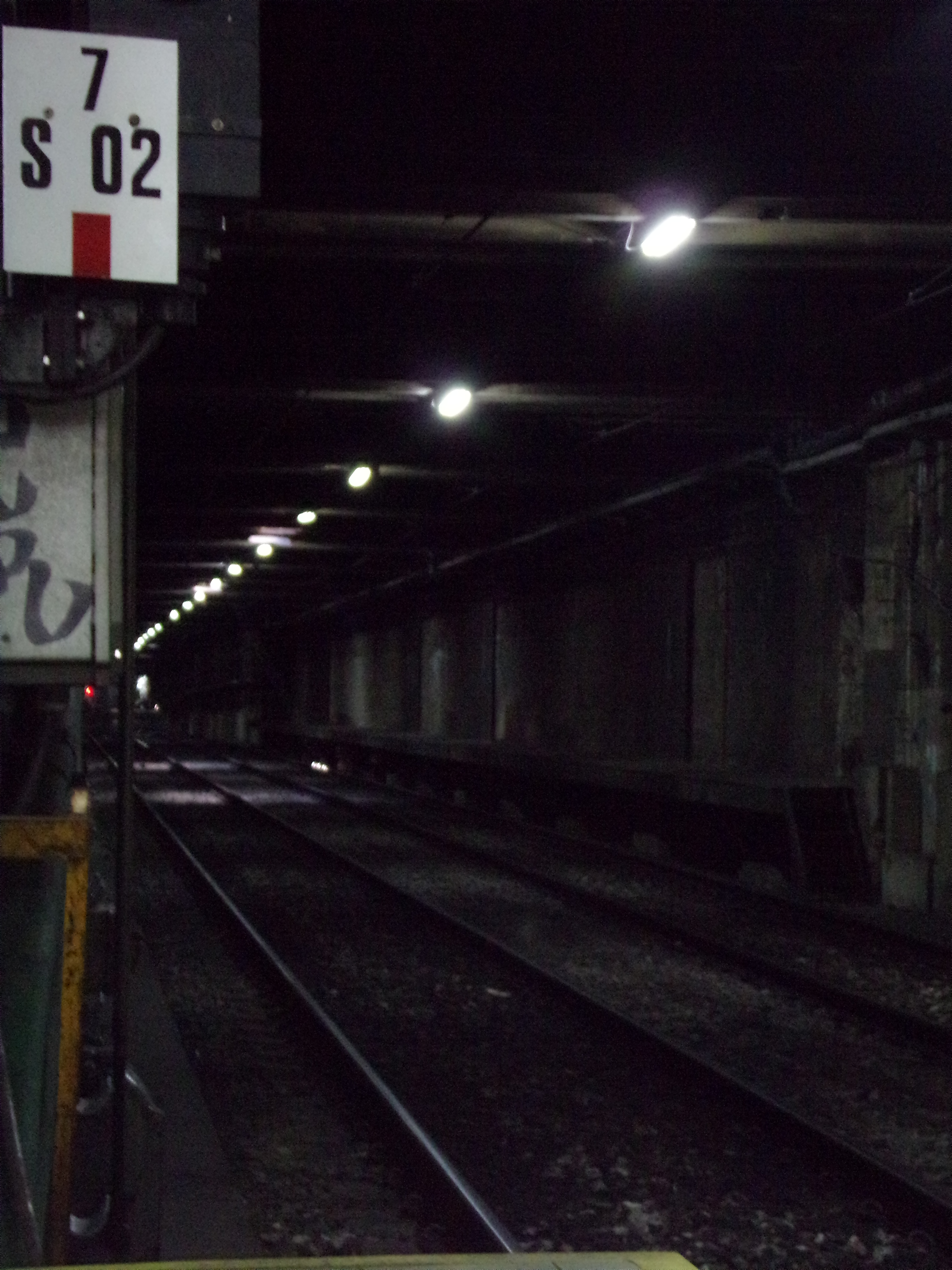 Pasco Sur desde Pasco Norte, línea A